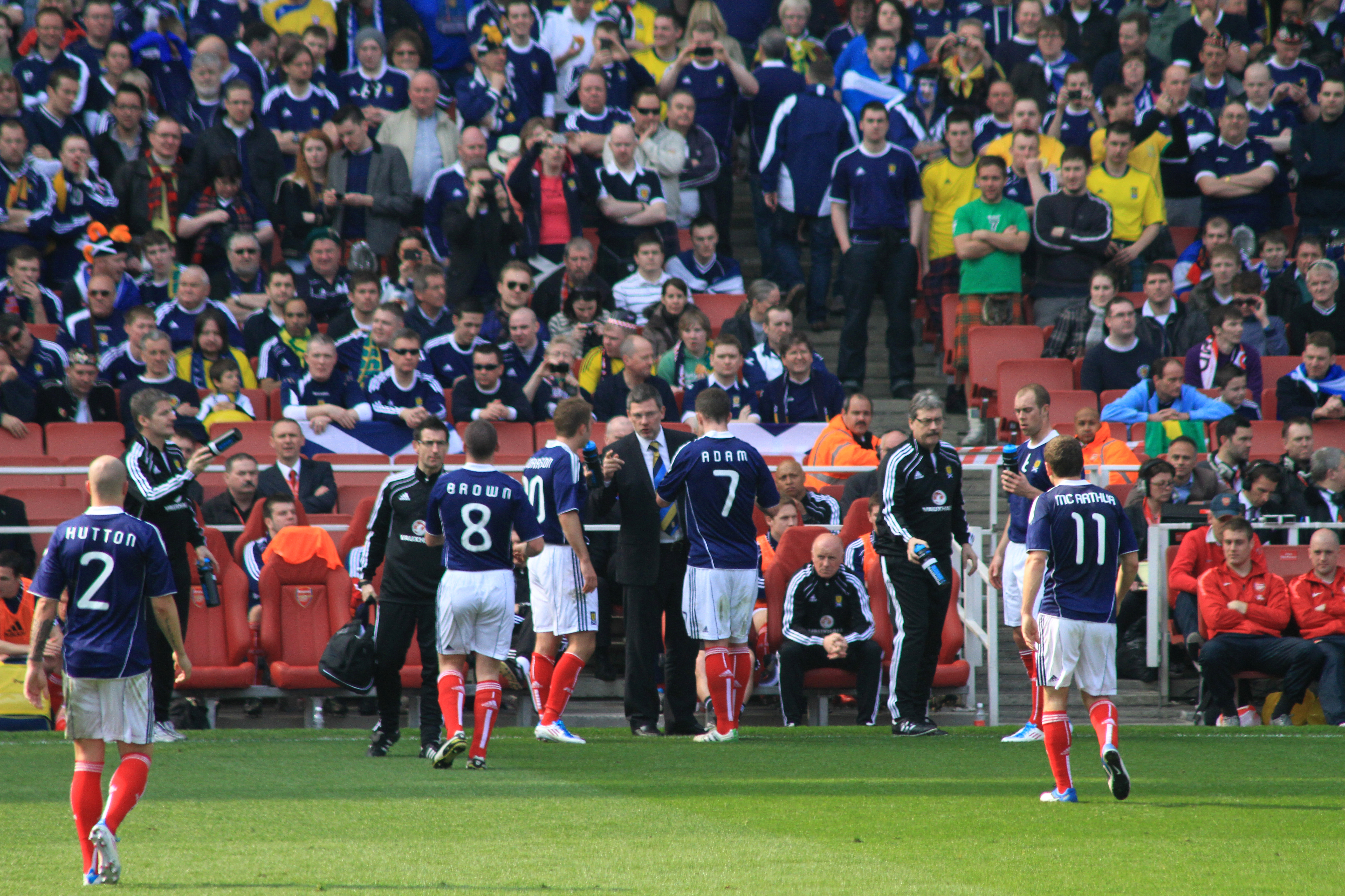 Craig Levein issues instructions